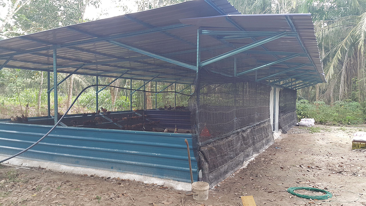 Reban ayam kampung warisan habeb